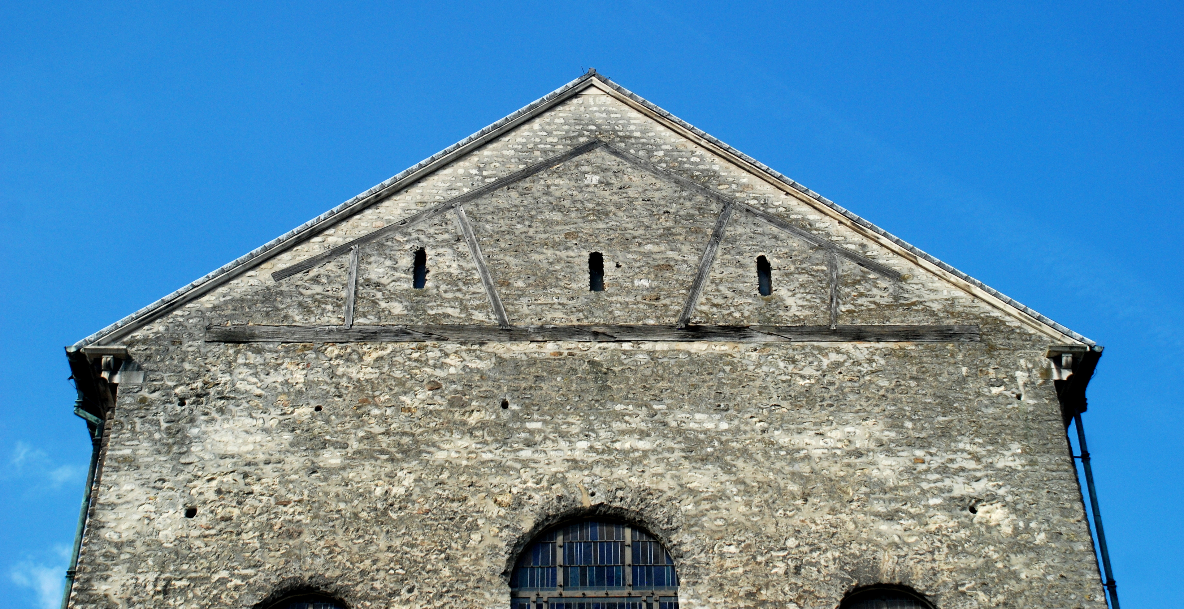 Belgique - Brabant wallon - Nivelles - Collégiale Sainte-Gertrude